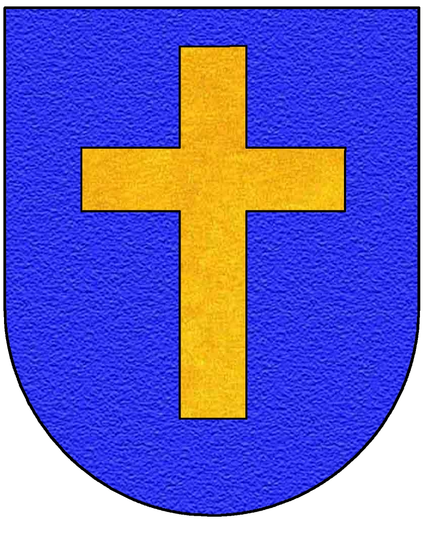 Wappen des 1803 gebildeten Fürstentums Fritzlar